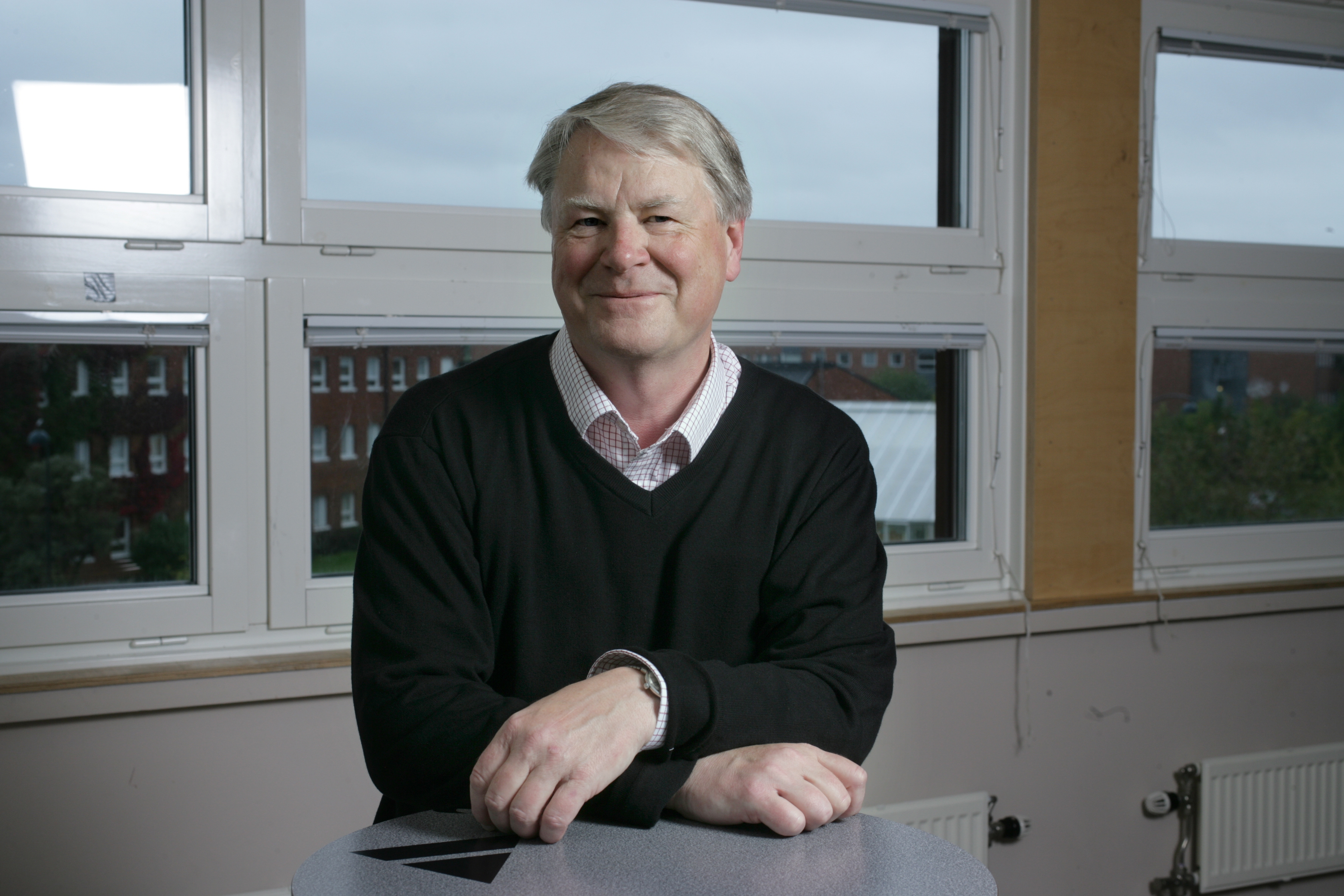 Anders Kjellberg, professor i sociologi Lunds universitet. Foto: september 2007